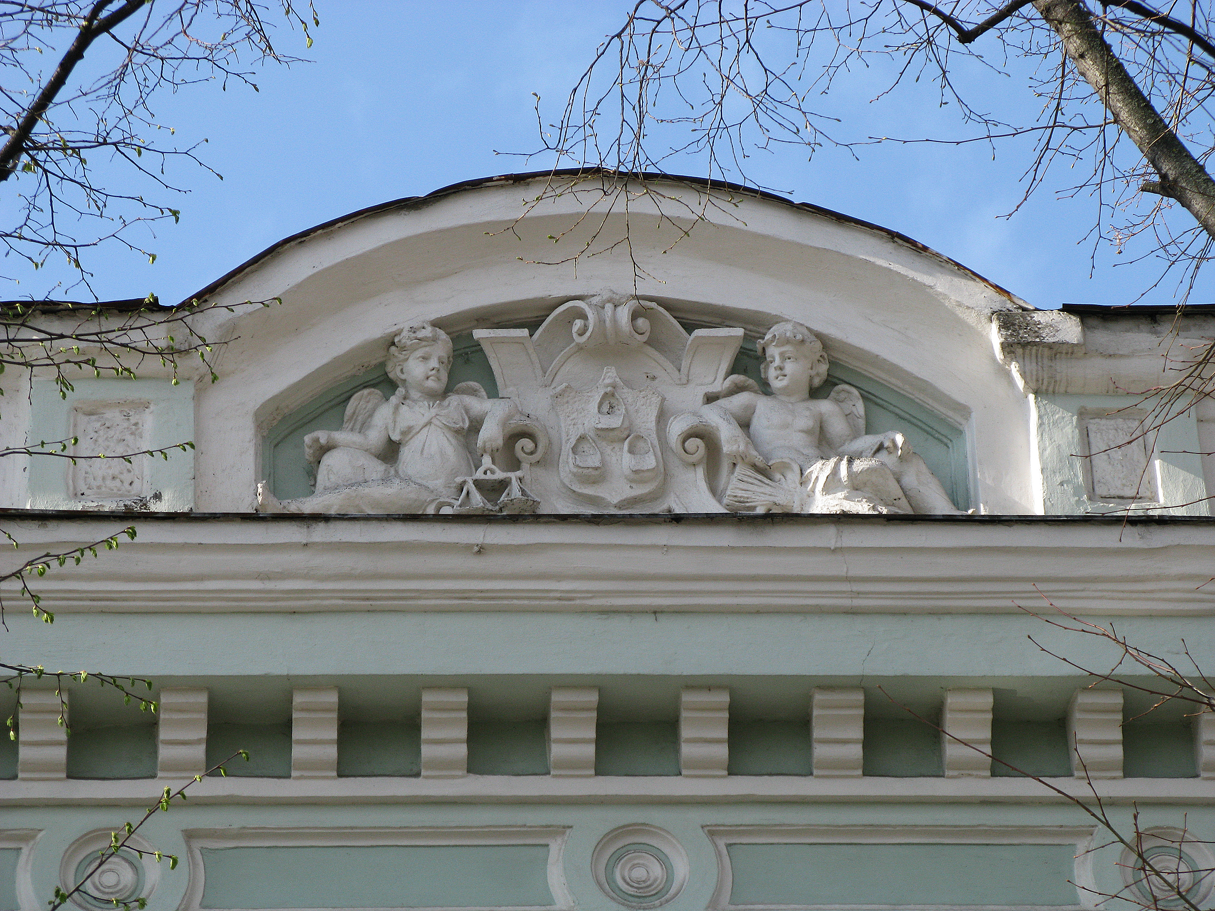 Сумська повітова земська управа, м. Суми, вул Герасима Кондратьєва, 2